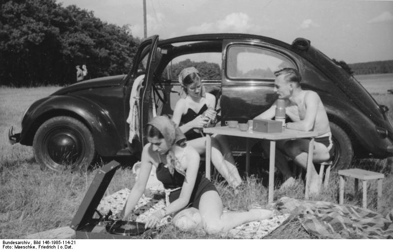 Mit dem Volkswagen unterwegs.